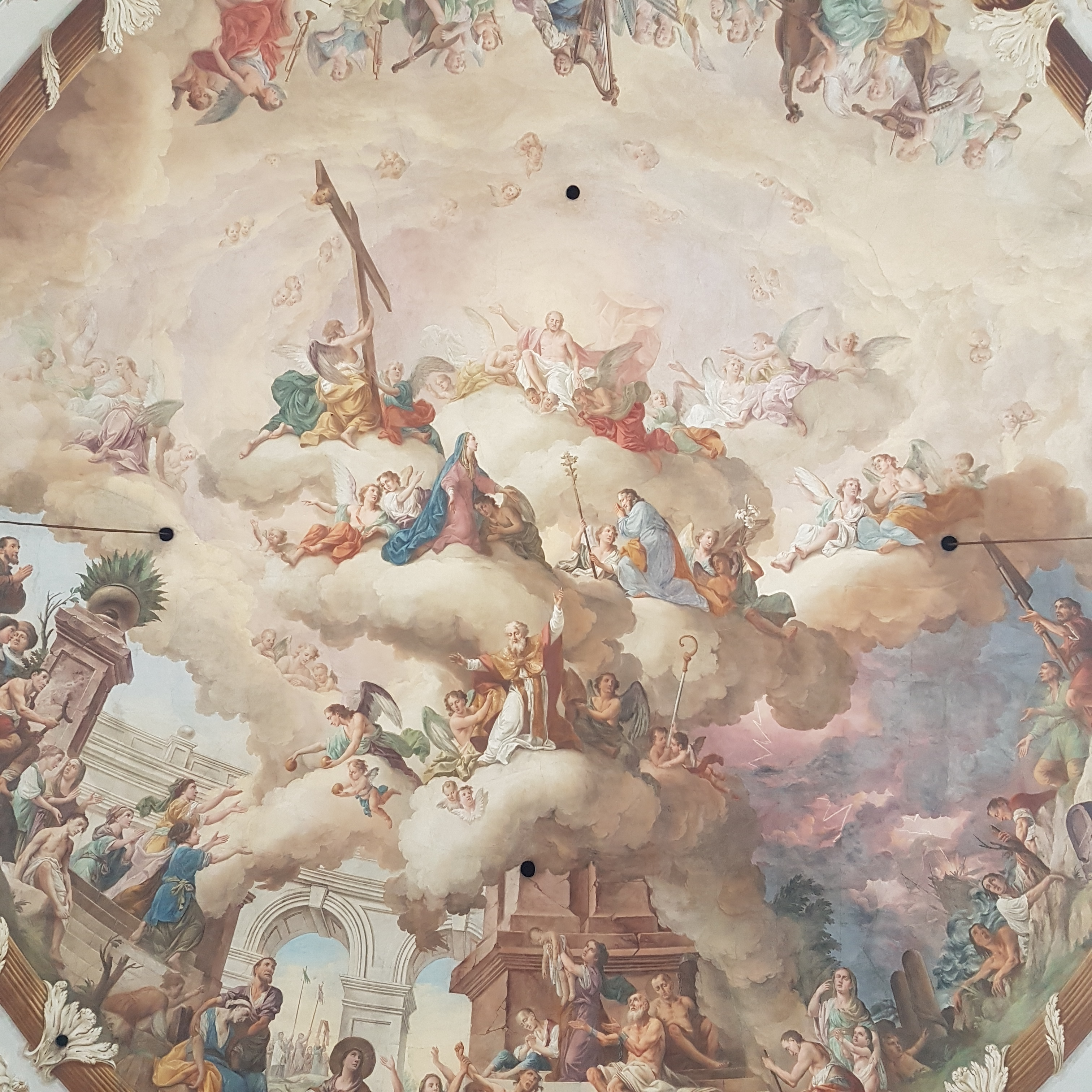 St. Nikolaus (Albaching), Langhausfresko